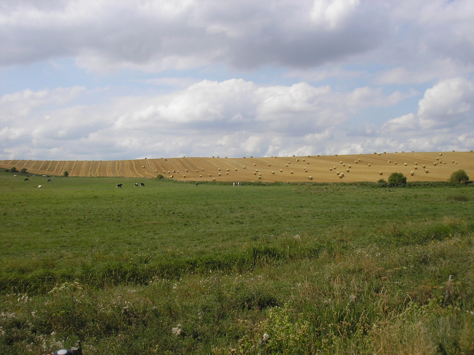 Blick in die Landschaft bei Goldberg (Mecklenburg).